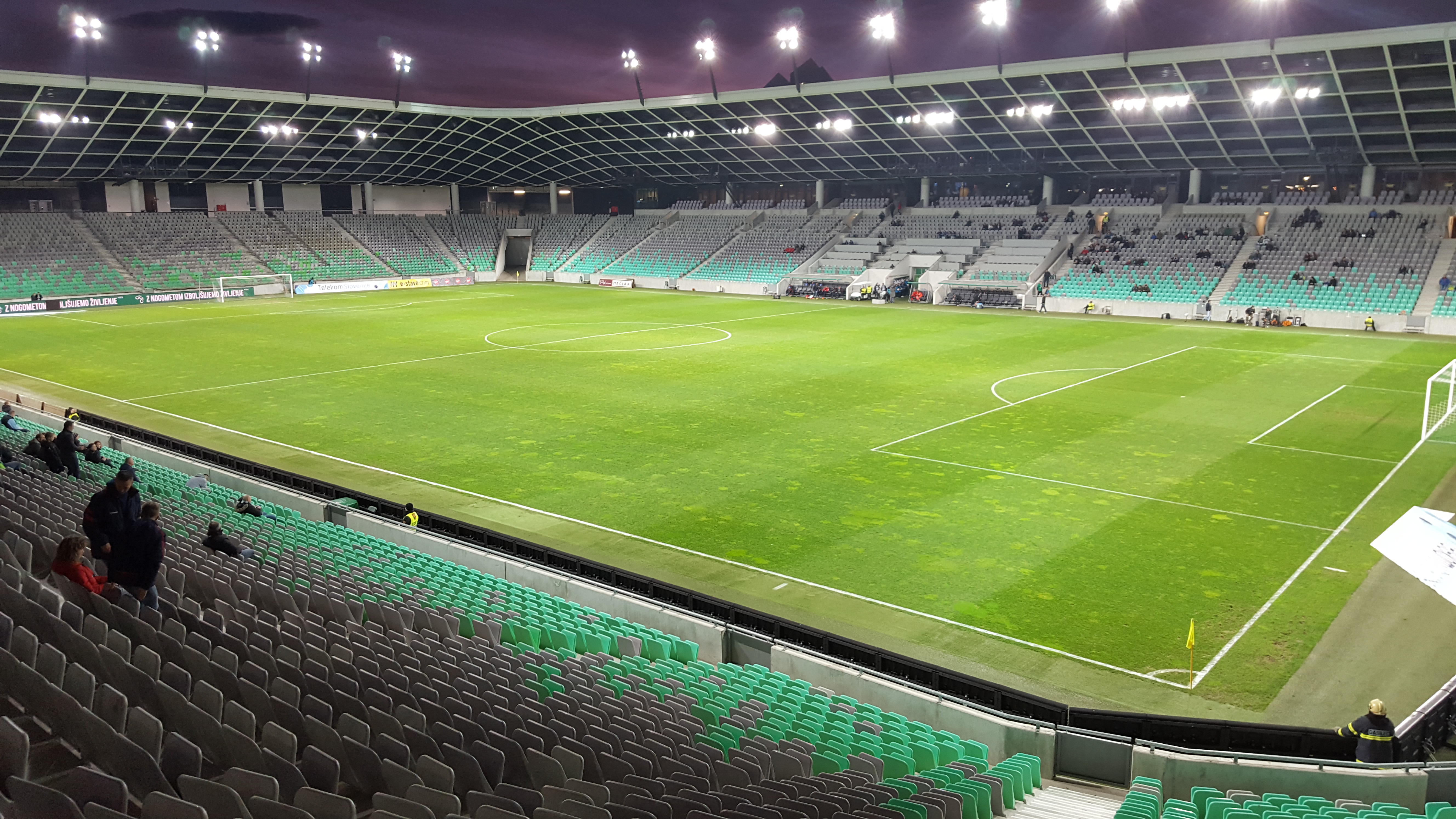 Stadion Stozice